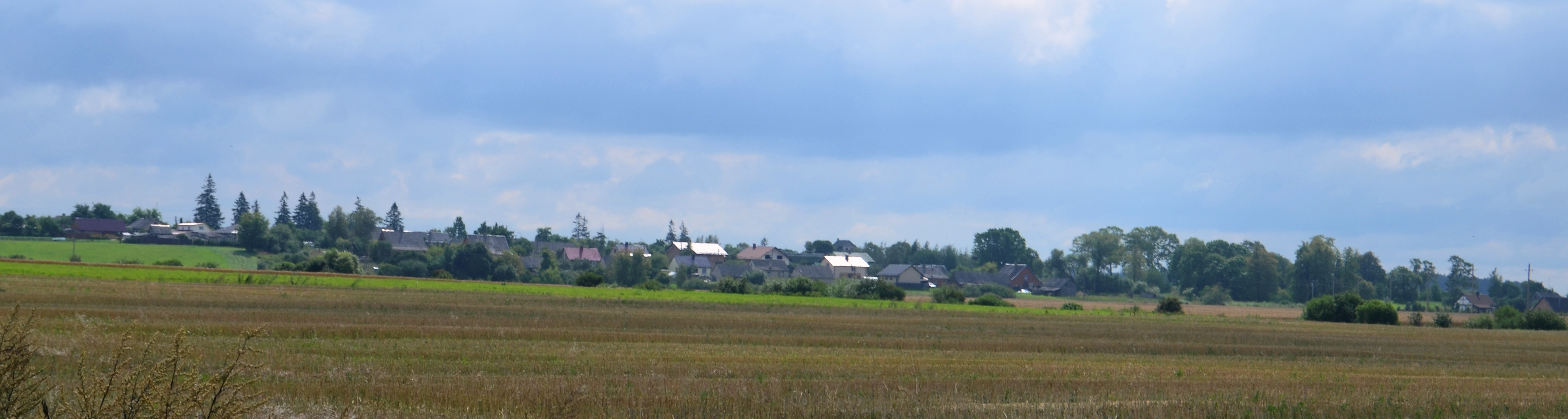 Mimaliai, Jonavos raj.